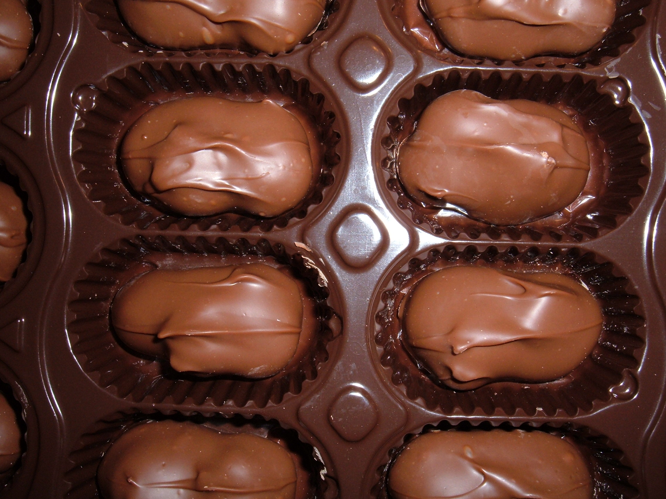 Chocolate-covered macadamia nuts